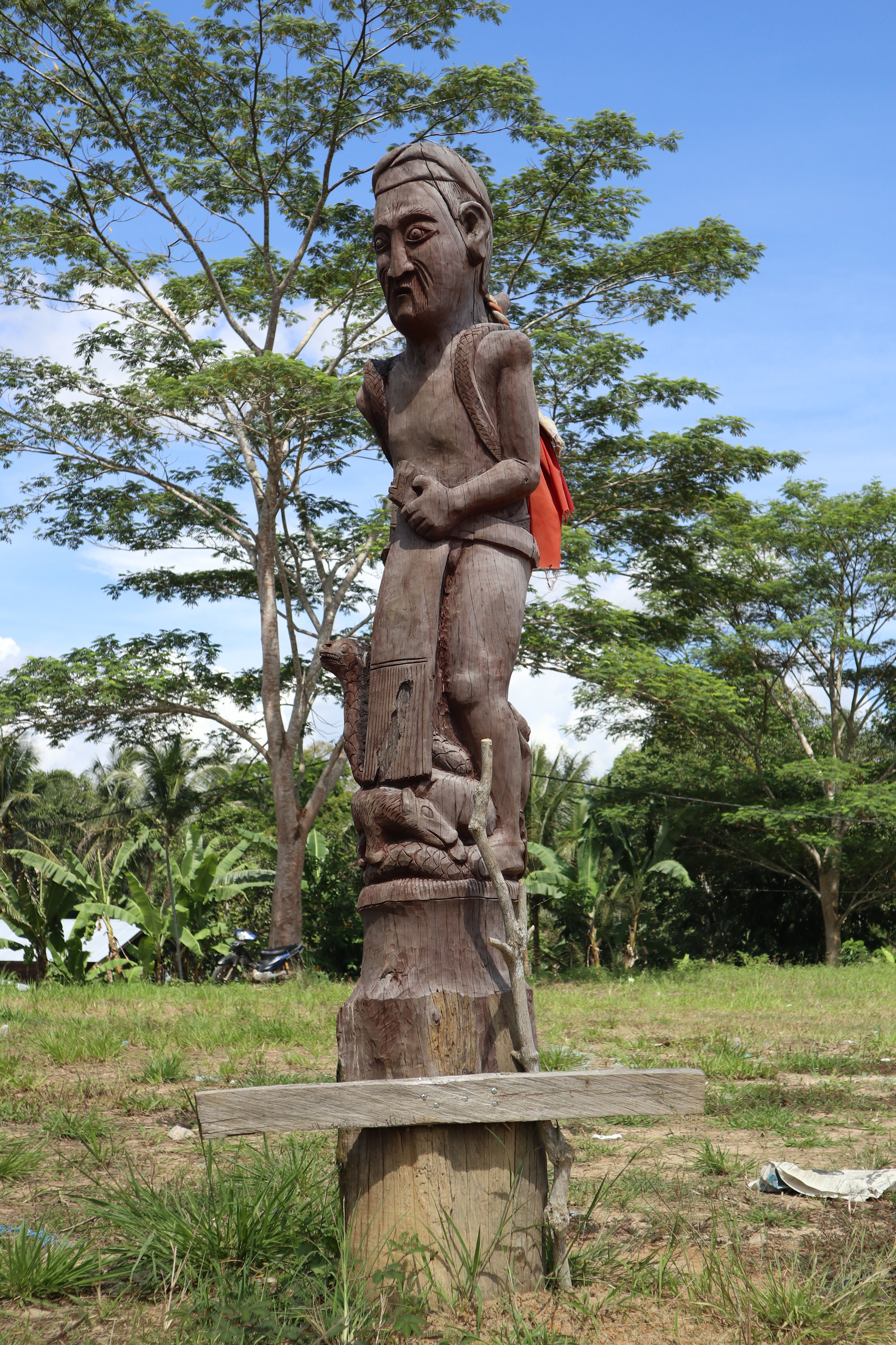 Blontakng adalah patung ukir terbuat dari kayu ulin yang merupakan patung simbol pada upacara kematian Kwangkay Suku Dayak Benuaq. Ukiran pada Blontakng biasanya berbentuk sosok manusia yang merupakan gambaran sosok yang meninggal.